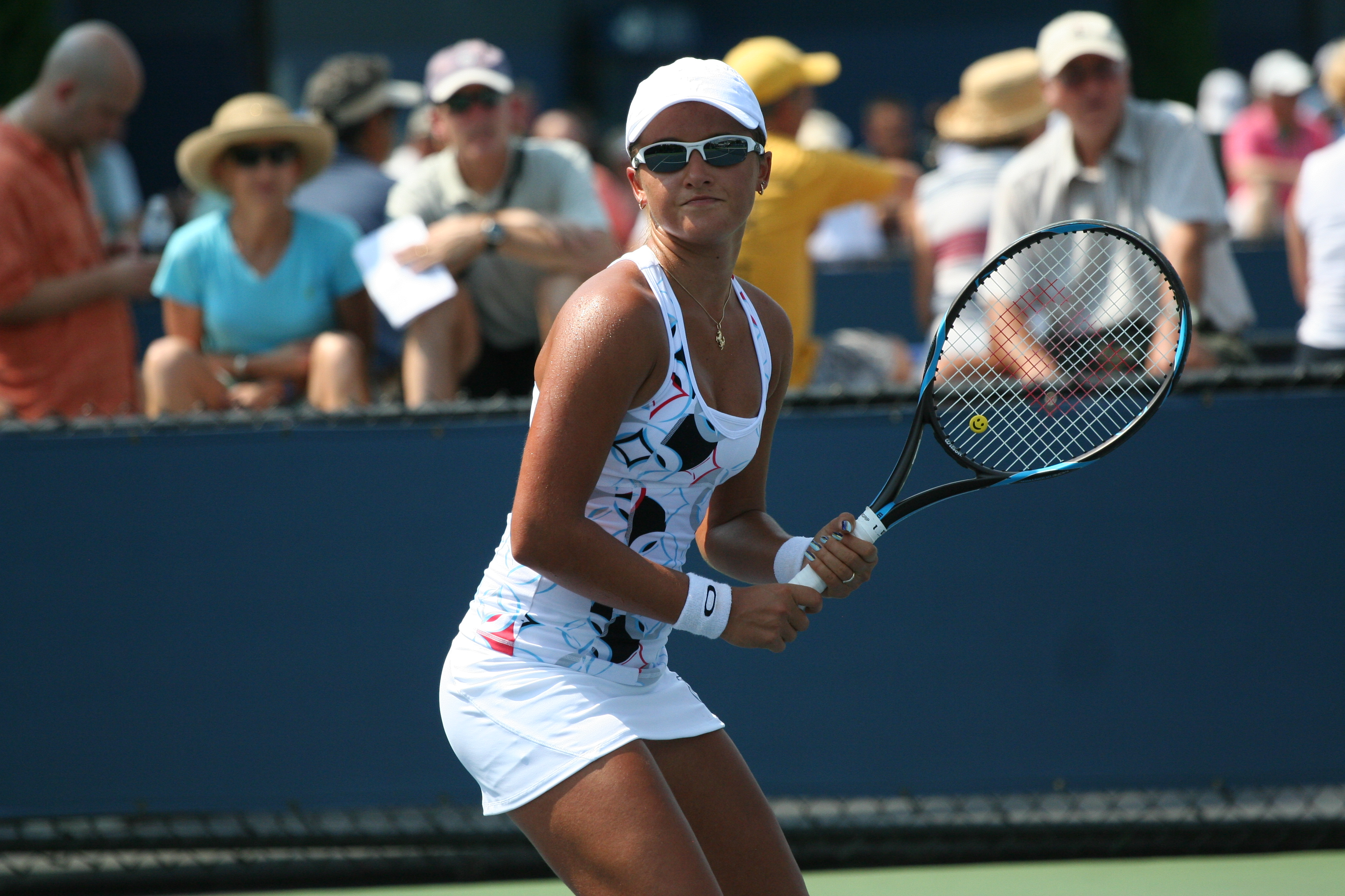 U.S. Open – Sept. 1, 2010